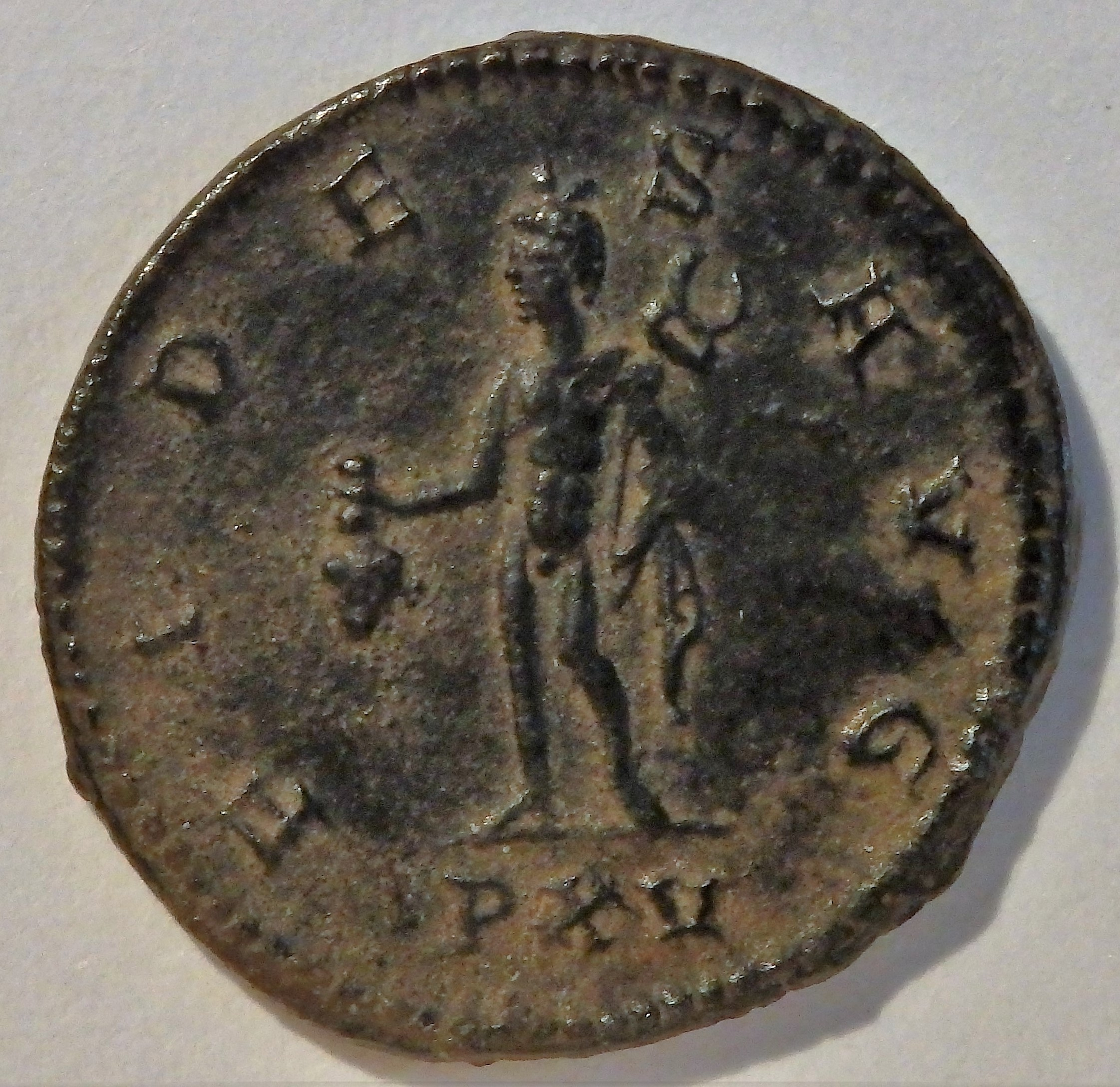 Mercur auf Rückseite eines Antoninian des Gallienus, Geldbeutel in der Hand, Kampmann 90.86